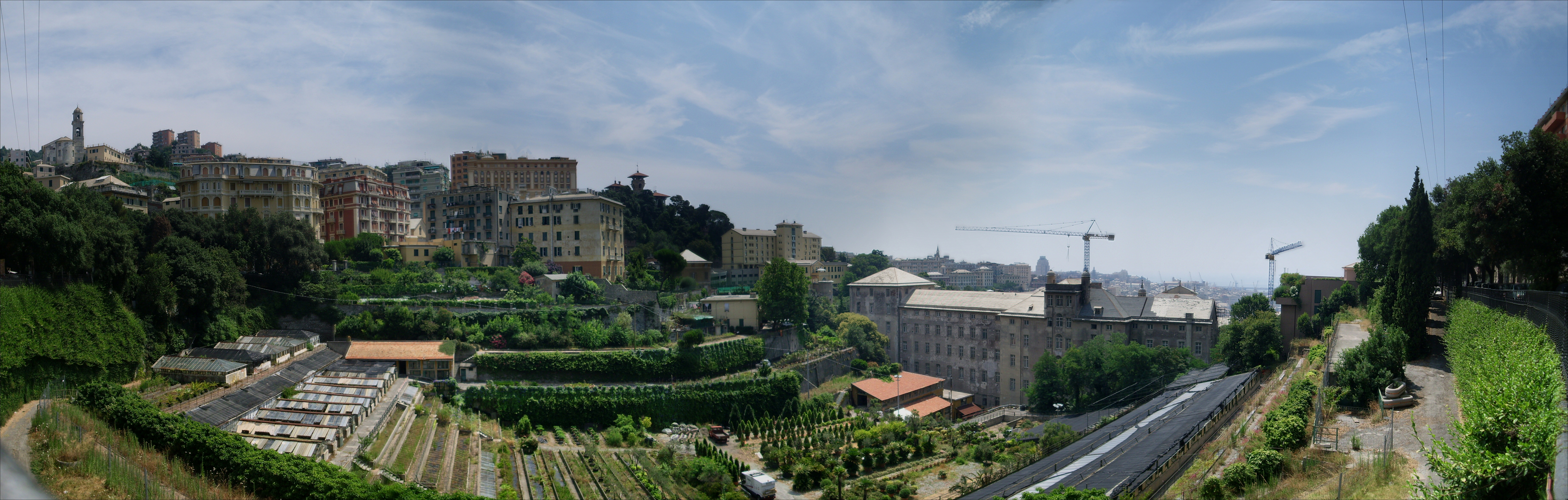 Panorama di Genova da Castelletto. Al centro della foto l'Albergo dei Poveri e le serre del Comune This panoramic image was created with Autostitch. Stitched images may differ from reality.